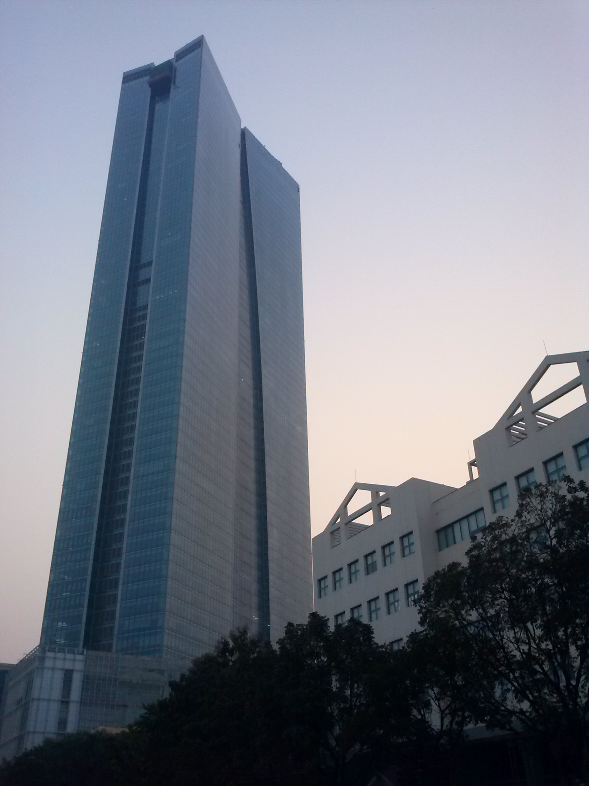 Lotte Center Hanoi đang xây dựng